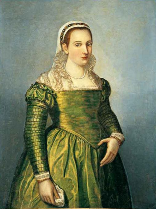 Ritratto nella Galleria Colonna di Roma (Fotografia Alinari). Image taken from Maria Bandini Buti, Enciclopedia biografica e bibliografica italiana: poetesse e scrittrici (Roma, 1941), vol. 1, p. 170.